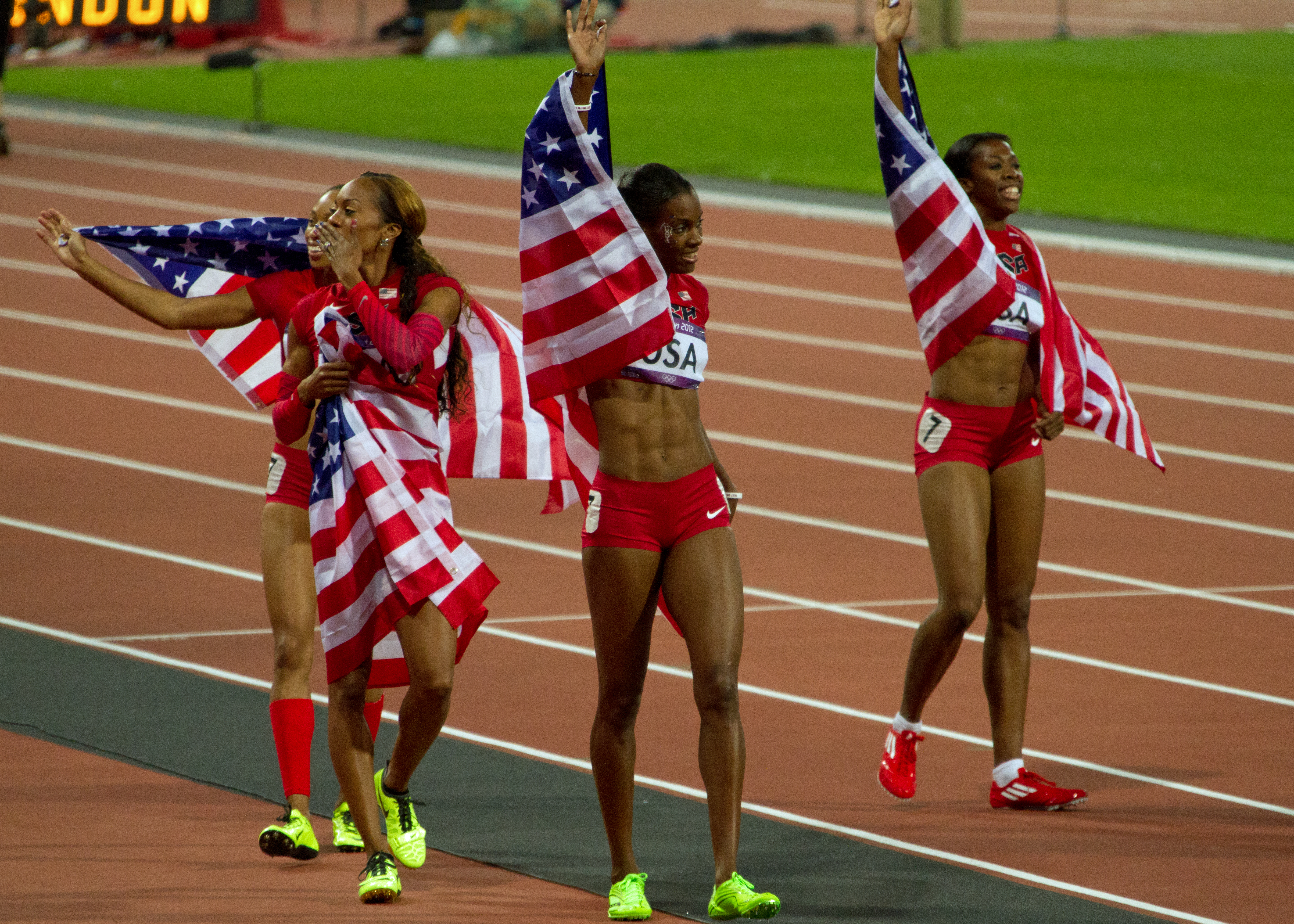 London 2012